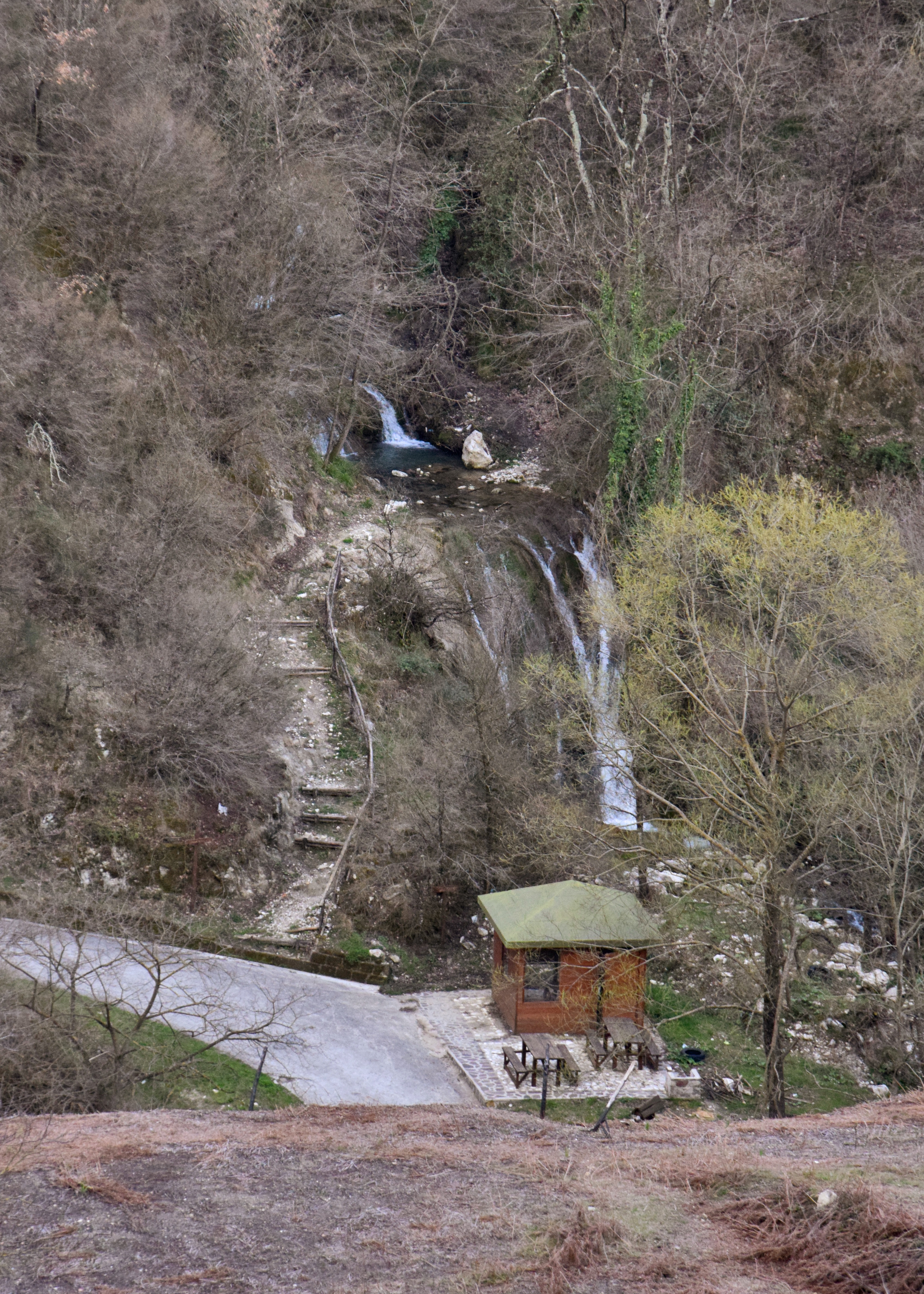 Le cascatelle del Pisciariello a Tocco Caudio (BN)